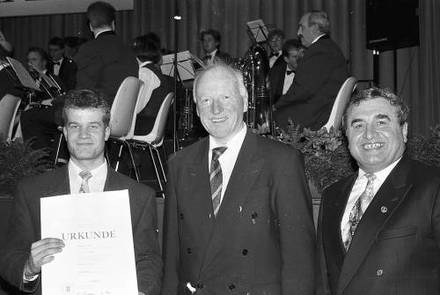 Freiburg im Breisgau: Innenminister Erwin Vetter bei der Meisterfeier der Handwerkskammer in Offenburg